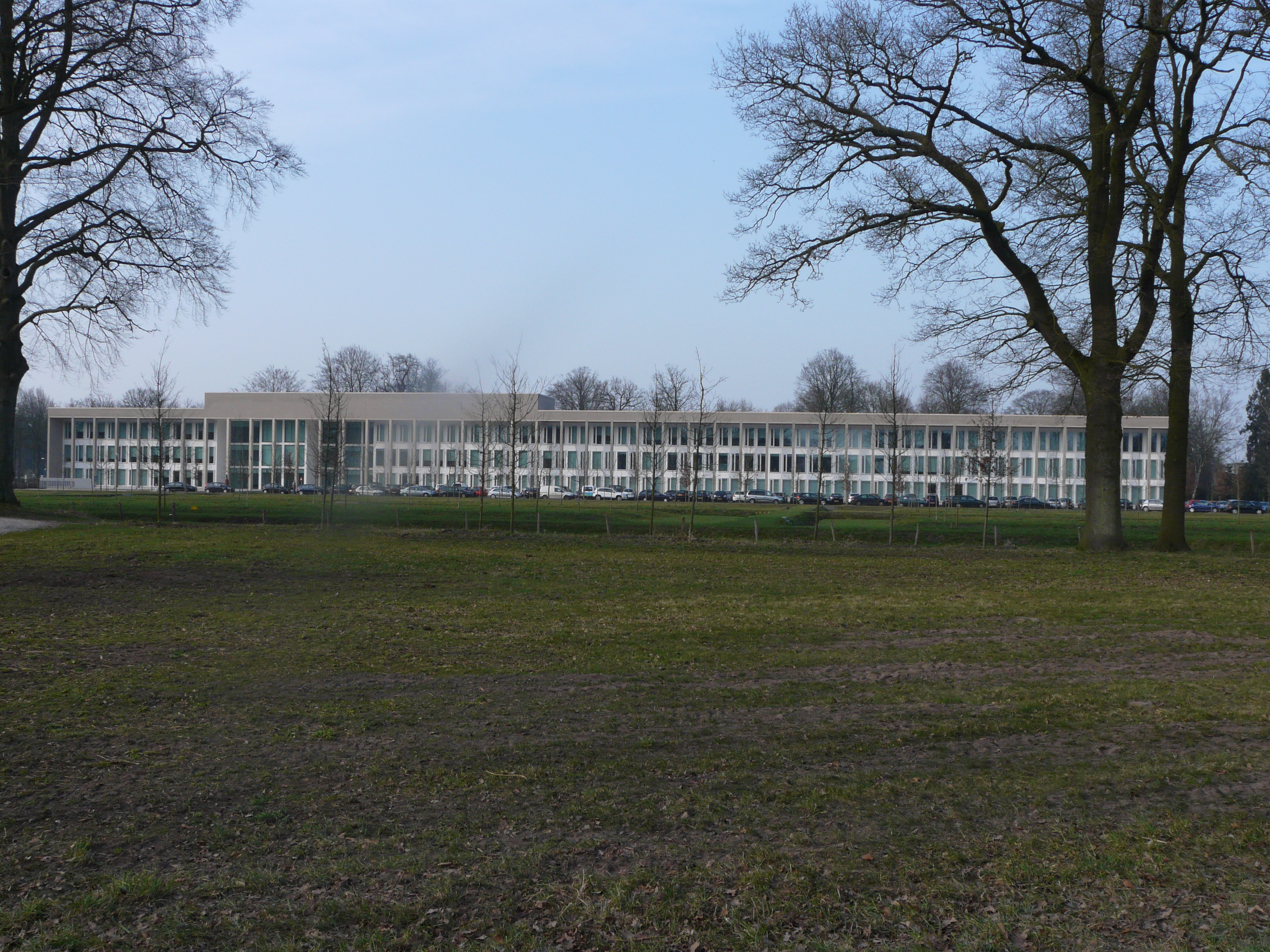 Kantoor Waterschap Brabantse Delta, Bouvignelaan 5, 4836 AA Breda. Gelegen nabij het Kasteel Bouvigne en het Markdal in Breda